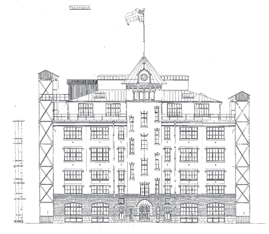 Fasadritning till "Freys Hyrverk" Grev Turegatan 11